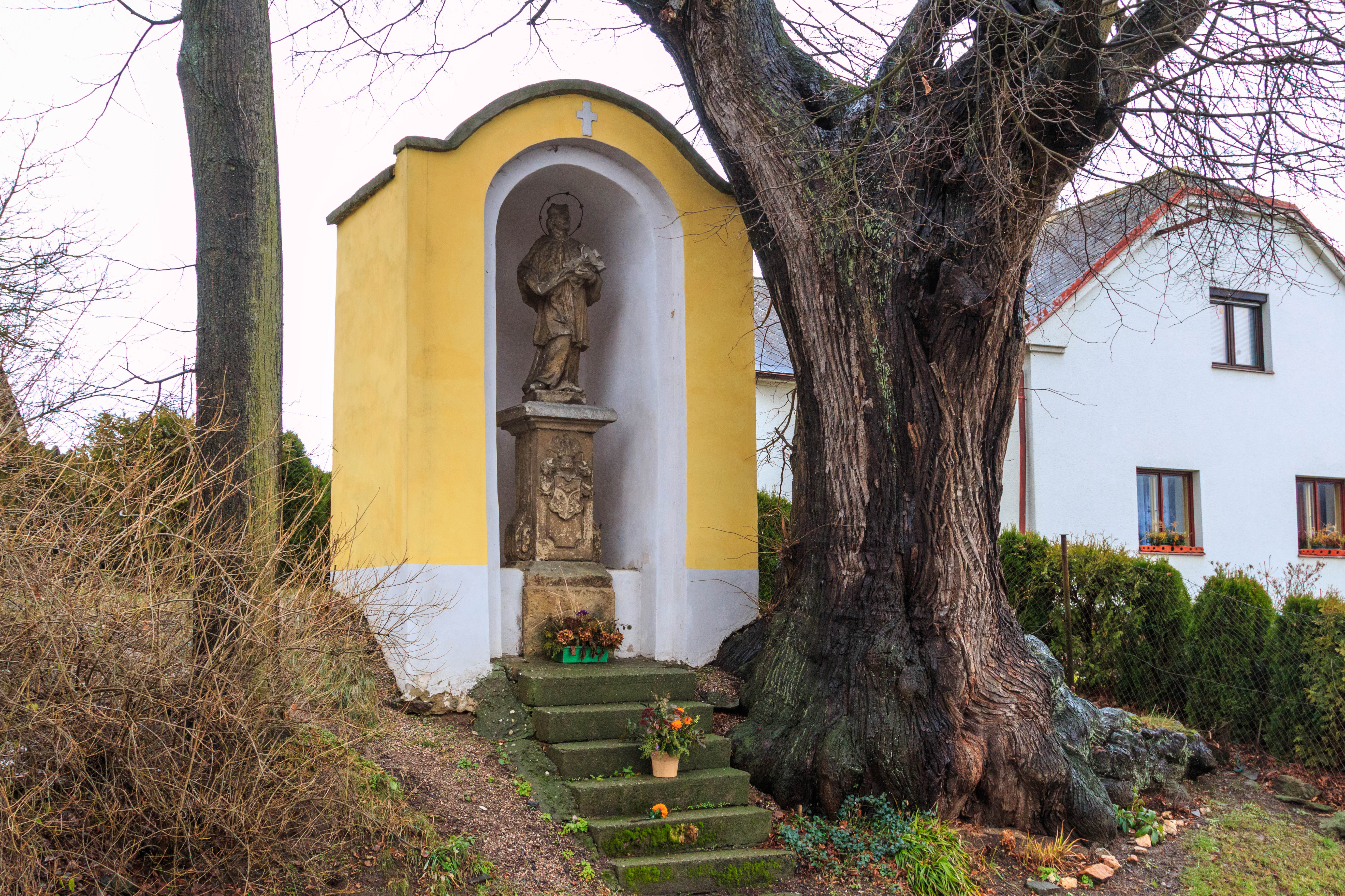 Bačkov svatý Jan Nepomucký